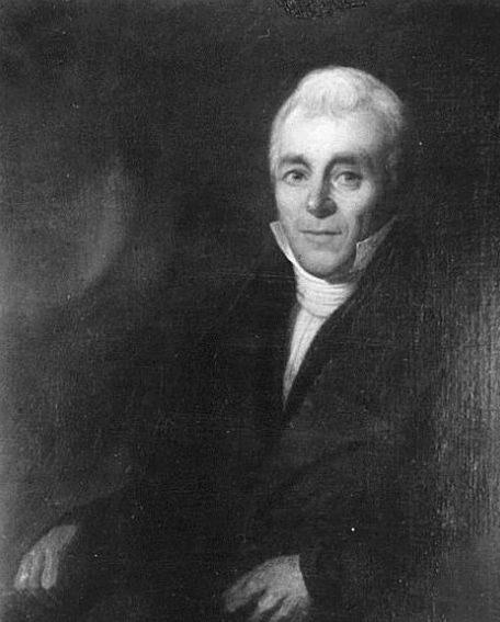 Portret van Rinse Koopmans (1770-1826)